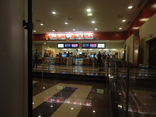 Cinemark - Uberlândia Shopping.